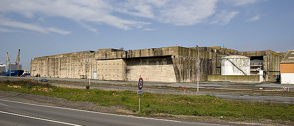 Base sous marine (WWII) du port de La Pallice vue Sud-Est. Pep.per de Ré Photo issue de ma banque d'images